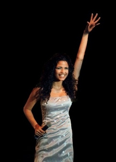 Emanuelle Araujo na Banda Eva em 2000.